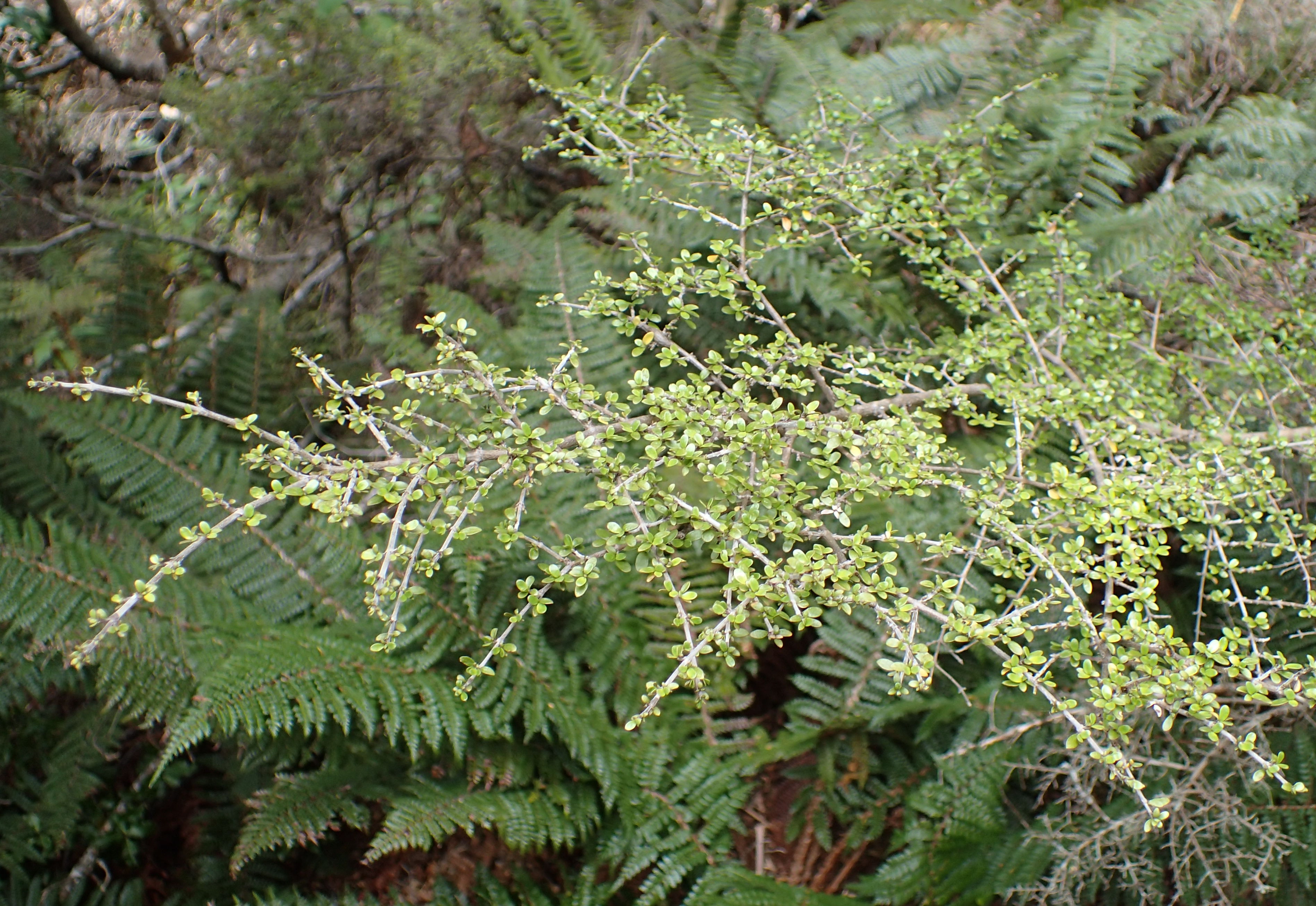 Coprosma dumosa in Aoraki Mt Cook Village, Canterbury (New Zealand)